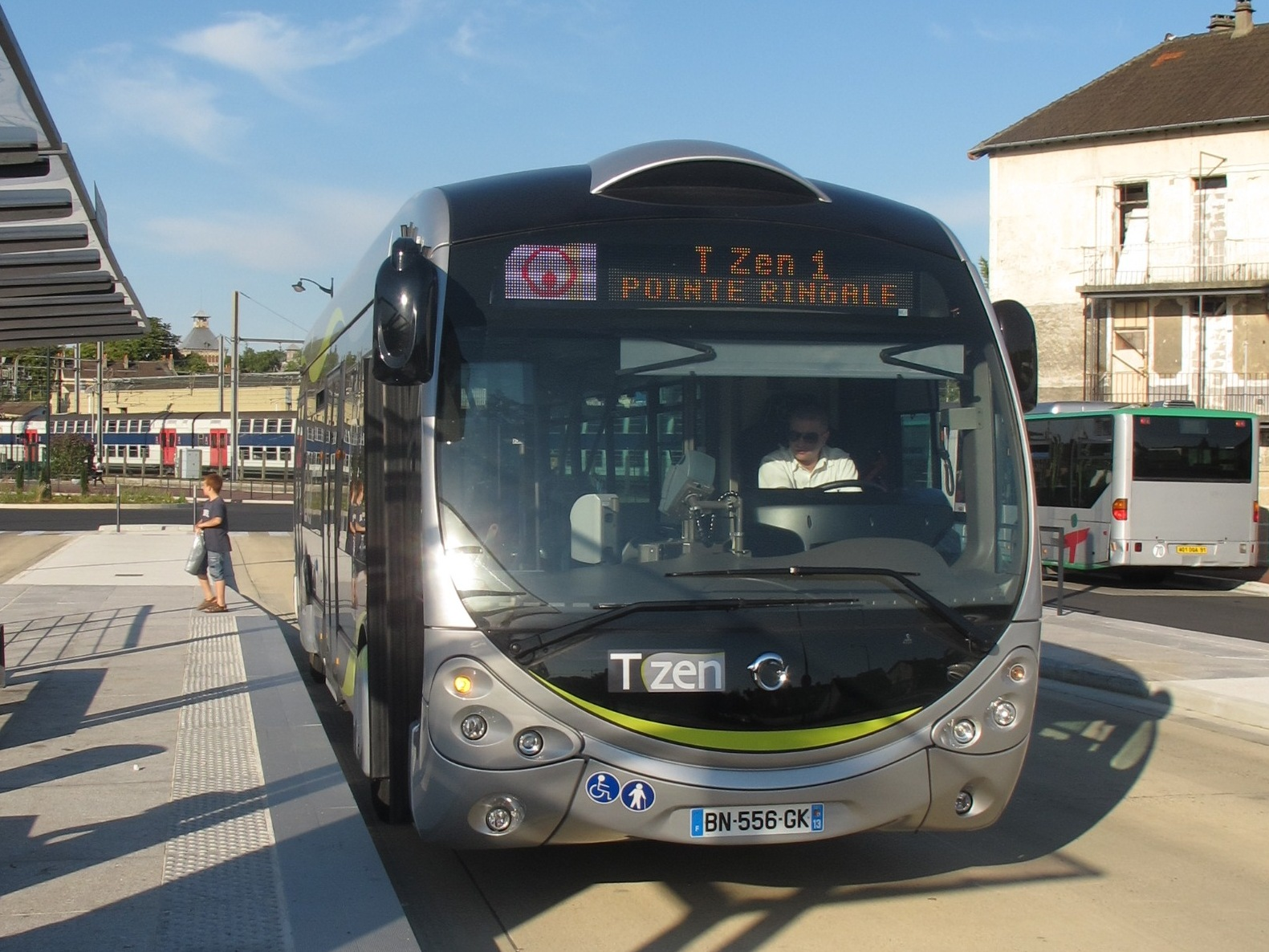 Bus T-ZEN ligne 1 - Gare de Lieusaint (Seine-et-Marne) - Gare de Corbeil-Essonnes (Essonne), France.